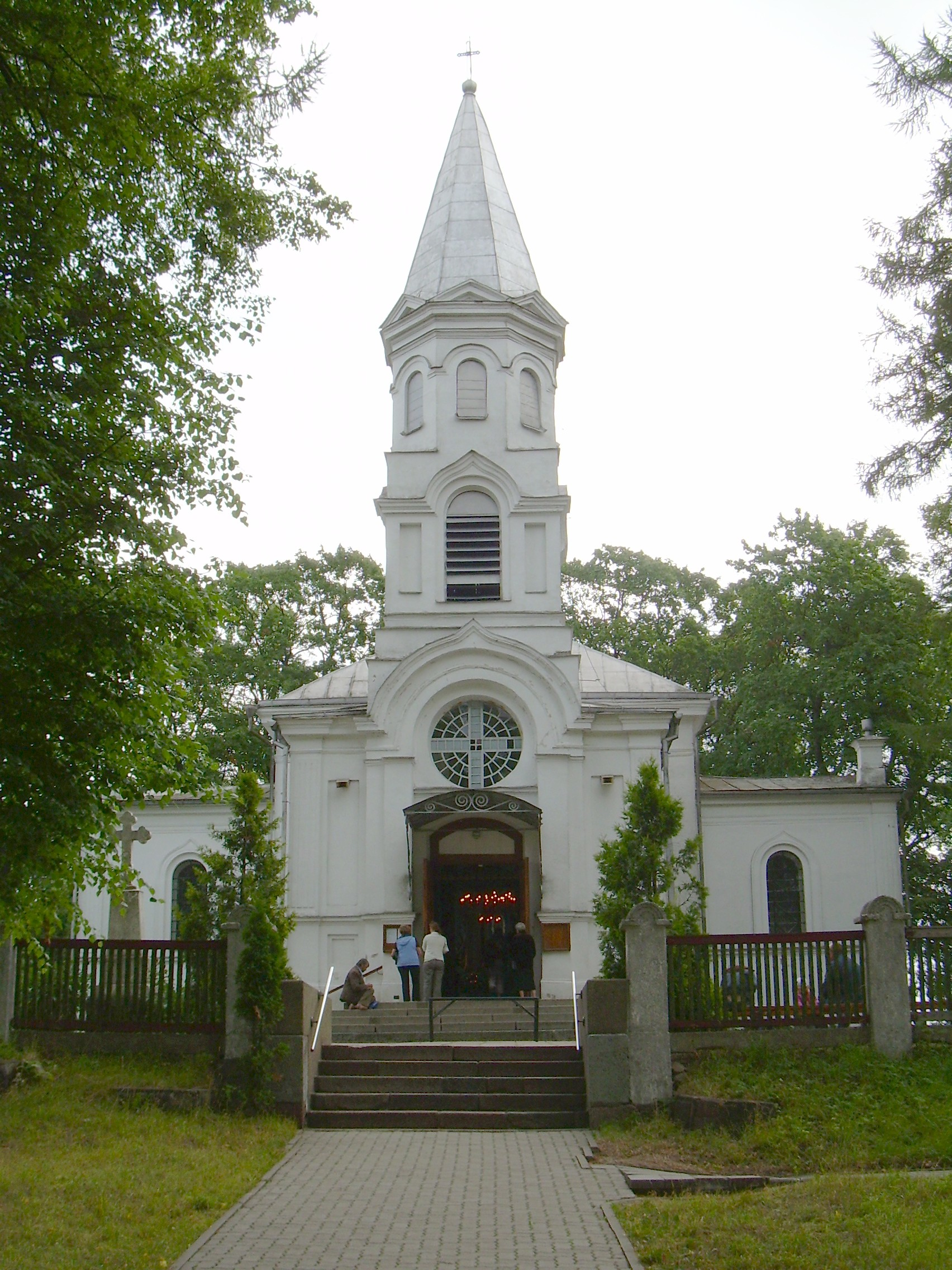 Telšių Švč. Mergelės Marijos Ėmimo į dangų bažnyčia